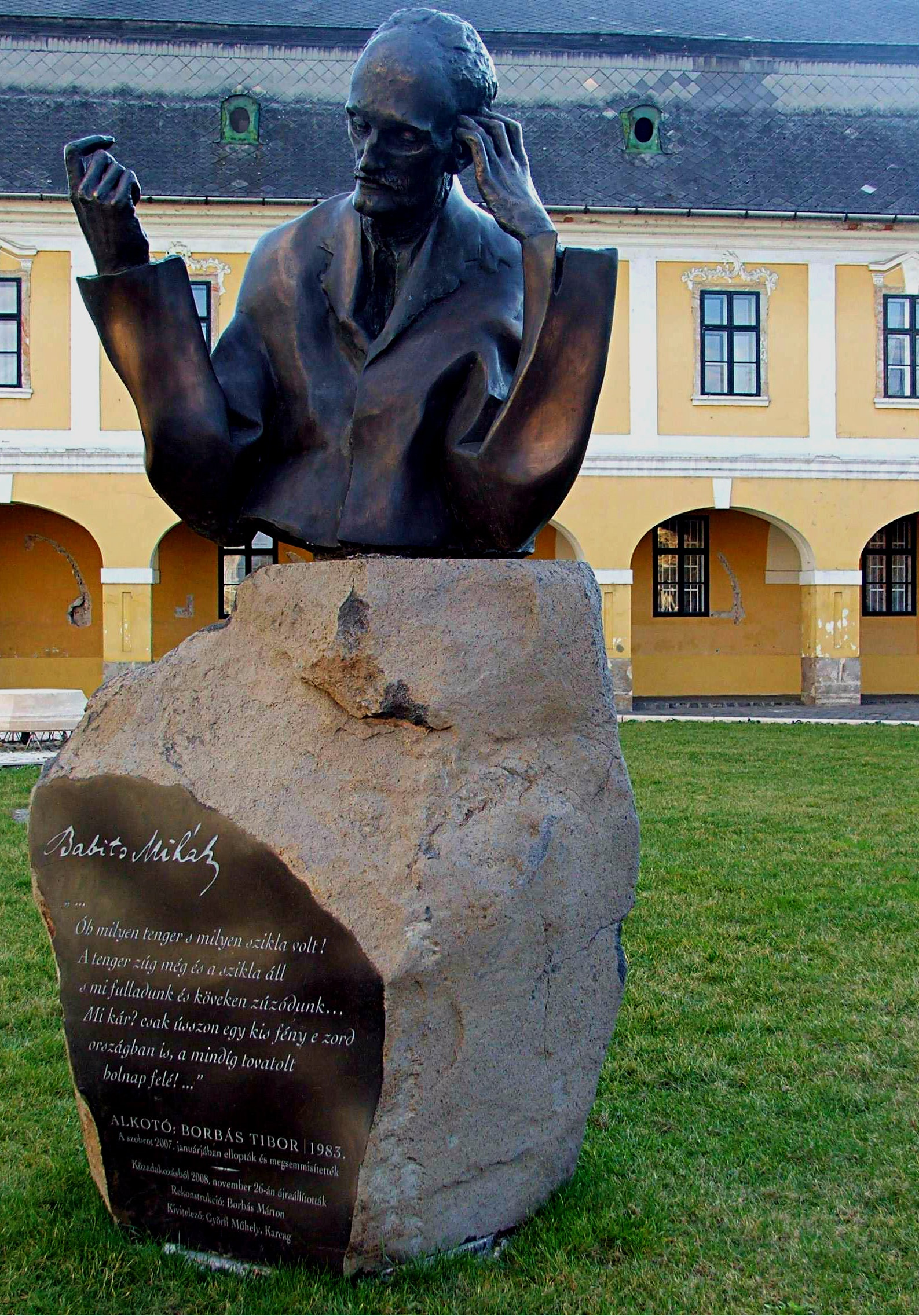 Babits Mihály szobra Esztergomban. Borbás Tibor alkotása (1983)